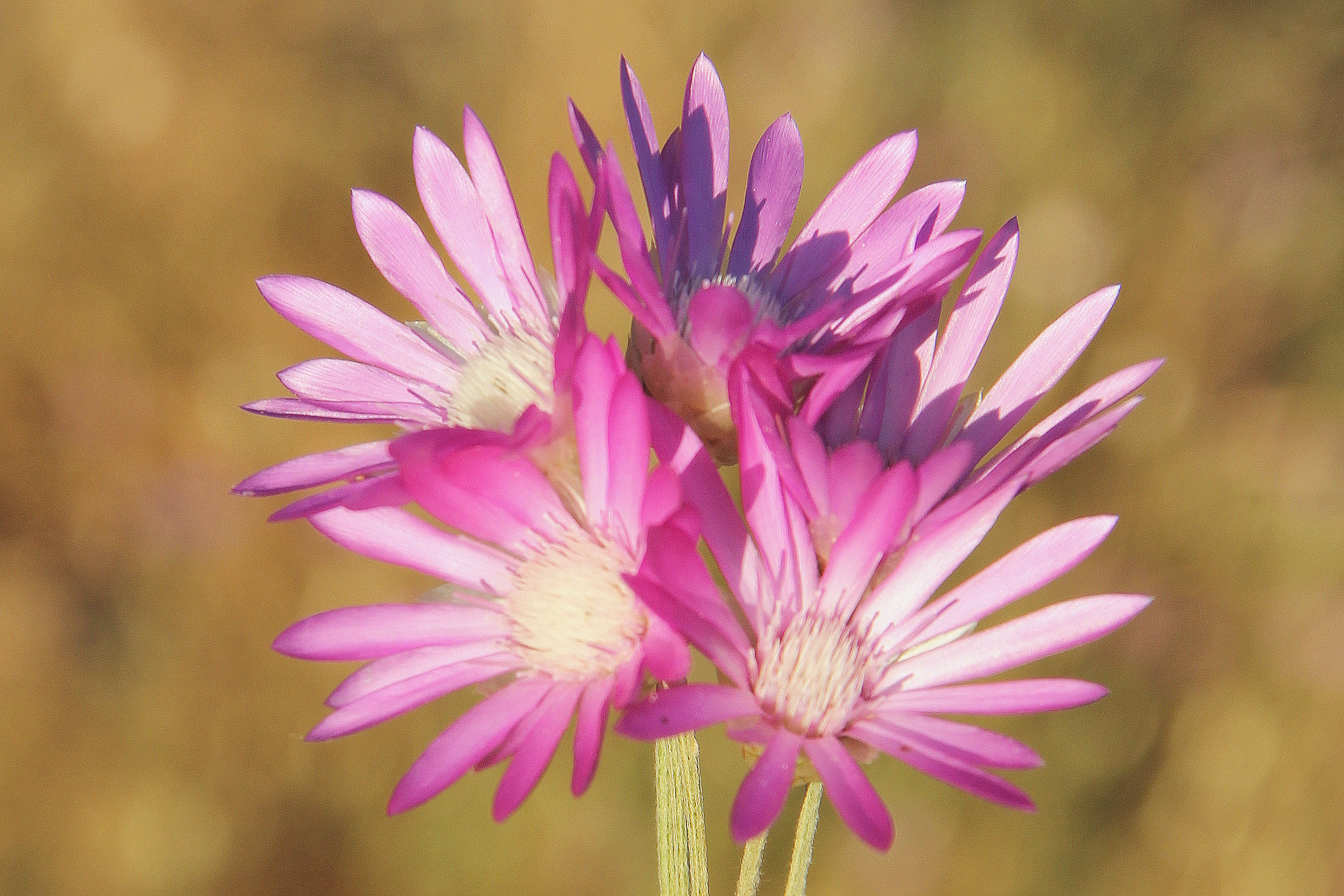 Yer:Mardin Xeranthemum annuum